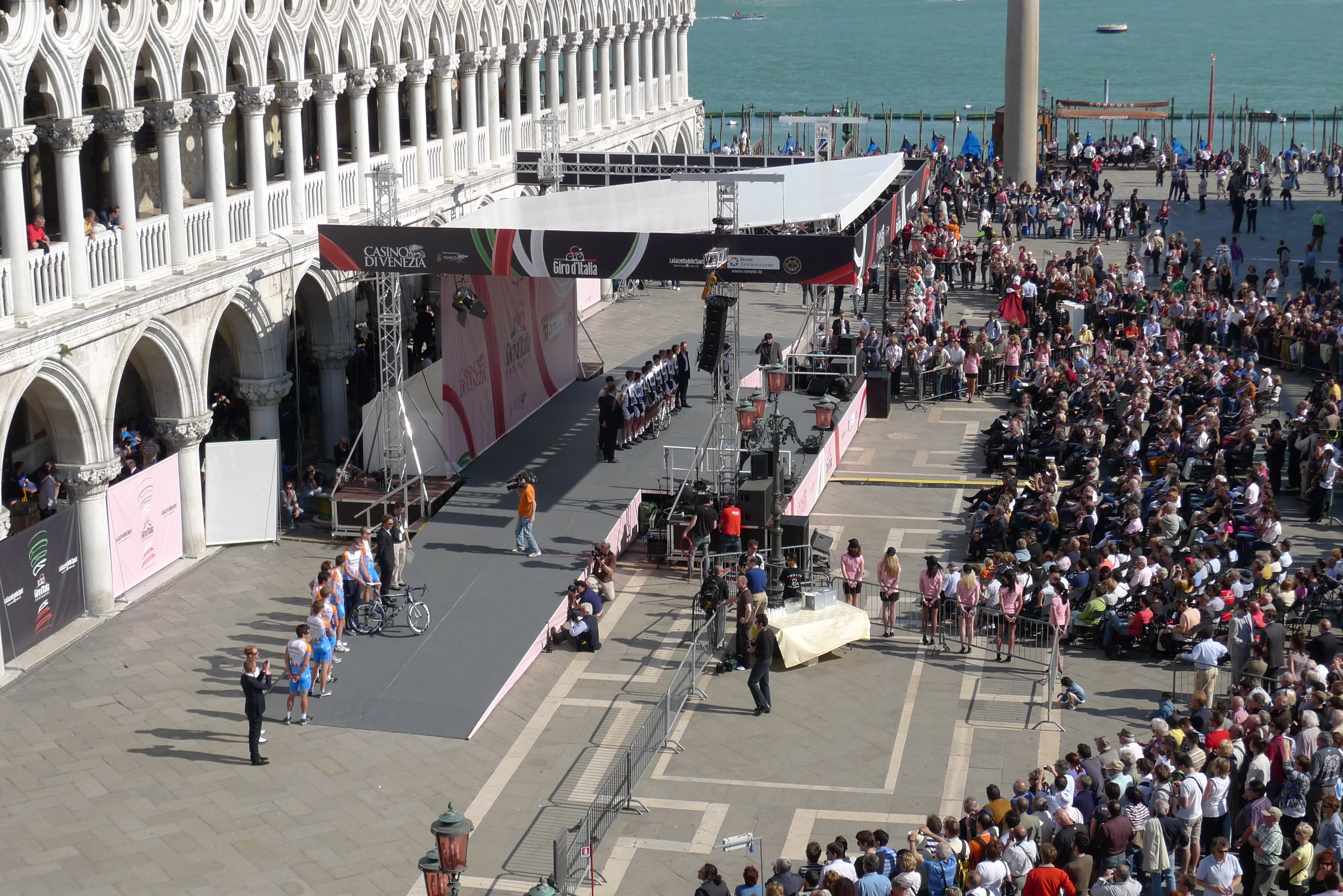 Giro d'Italia 2009 Teams presentation in Venice